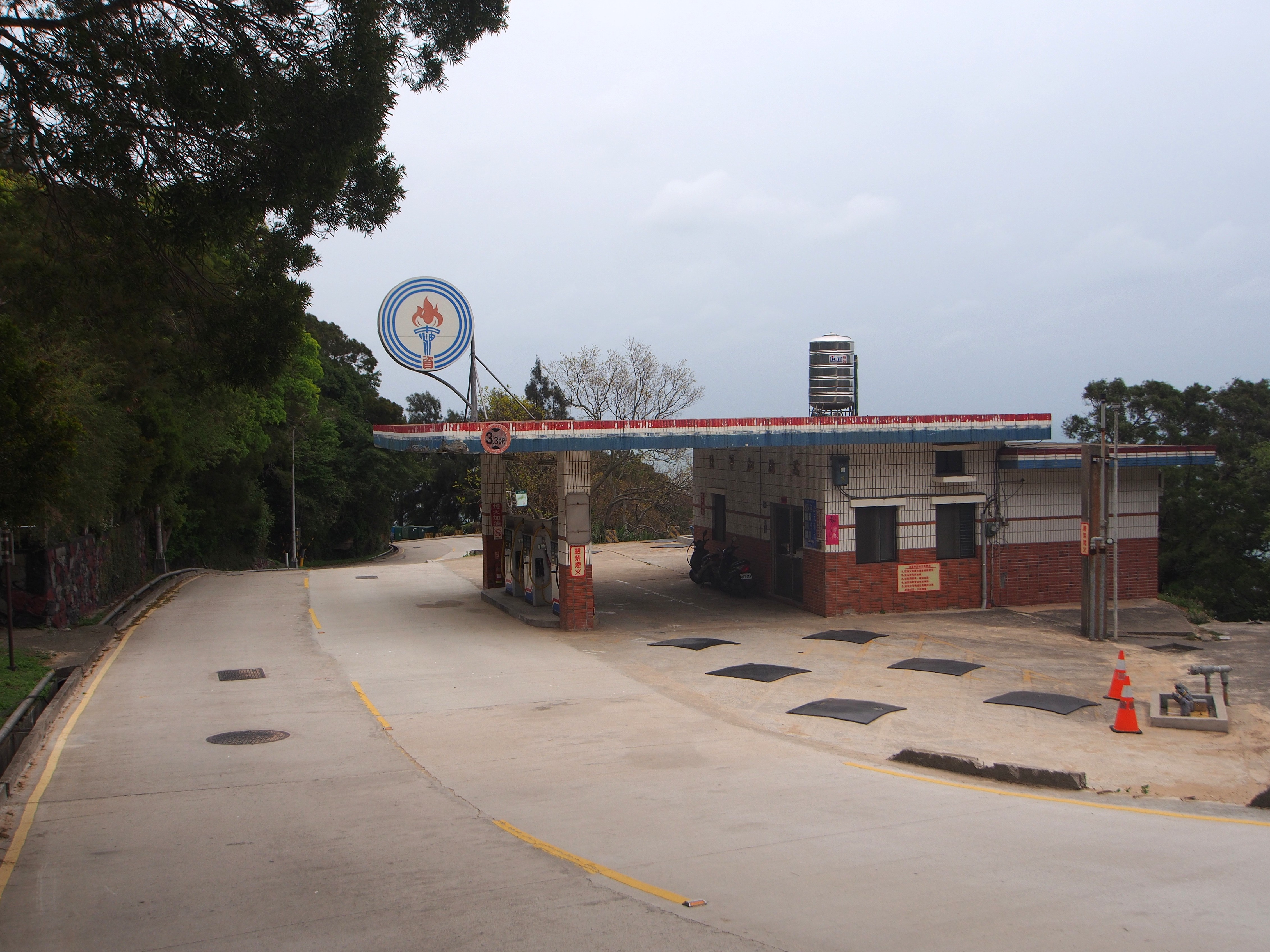 北竿加油站 - Beigan Gas Station - 2014.04